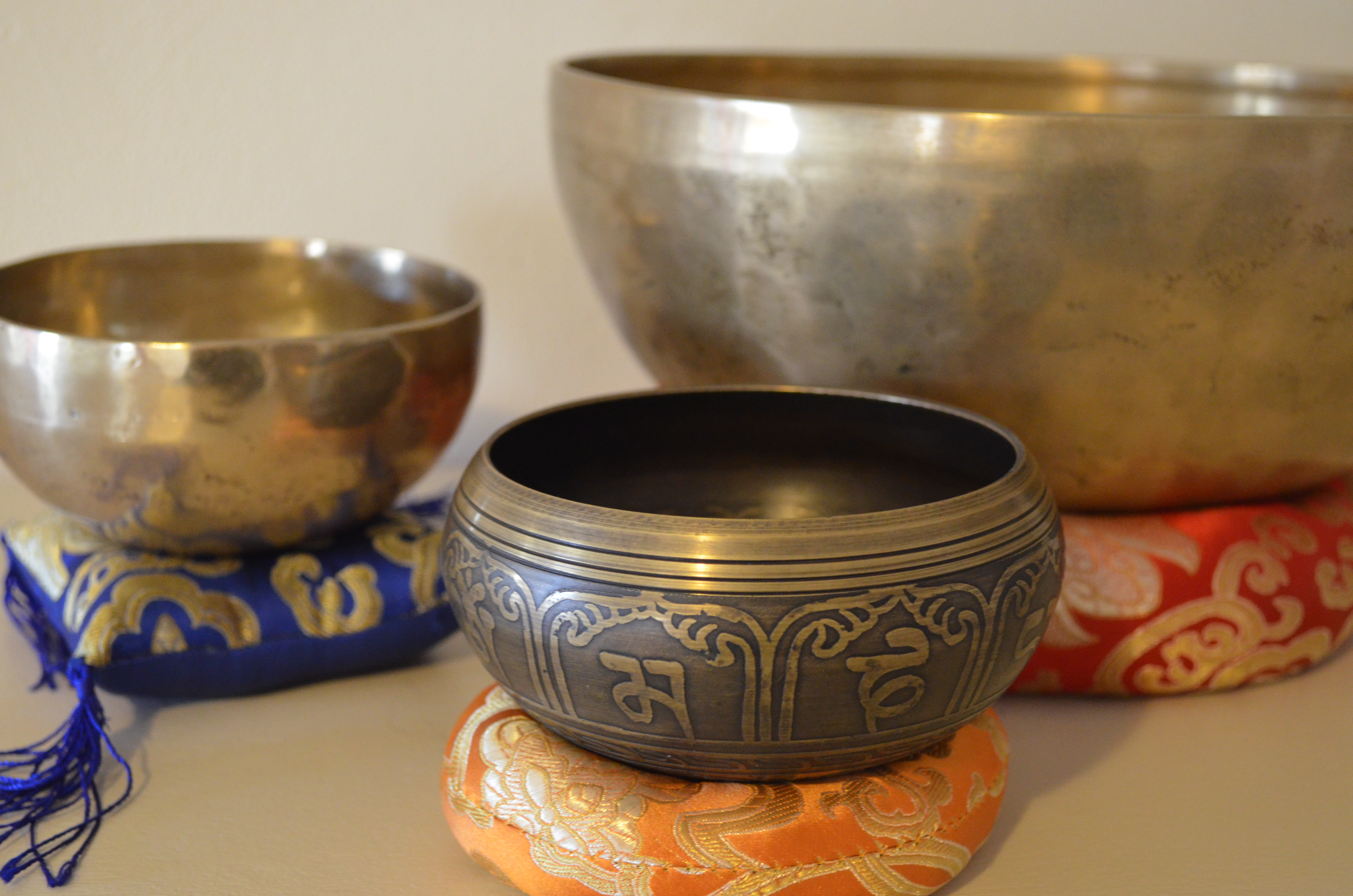 Tibetan Singing Bowls: one 11" and two 4.5"